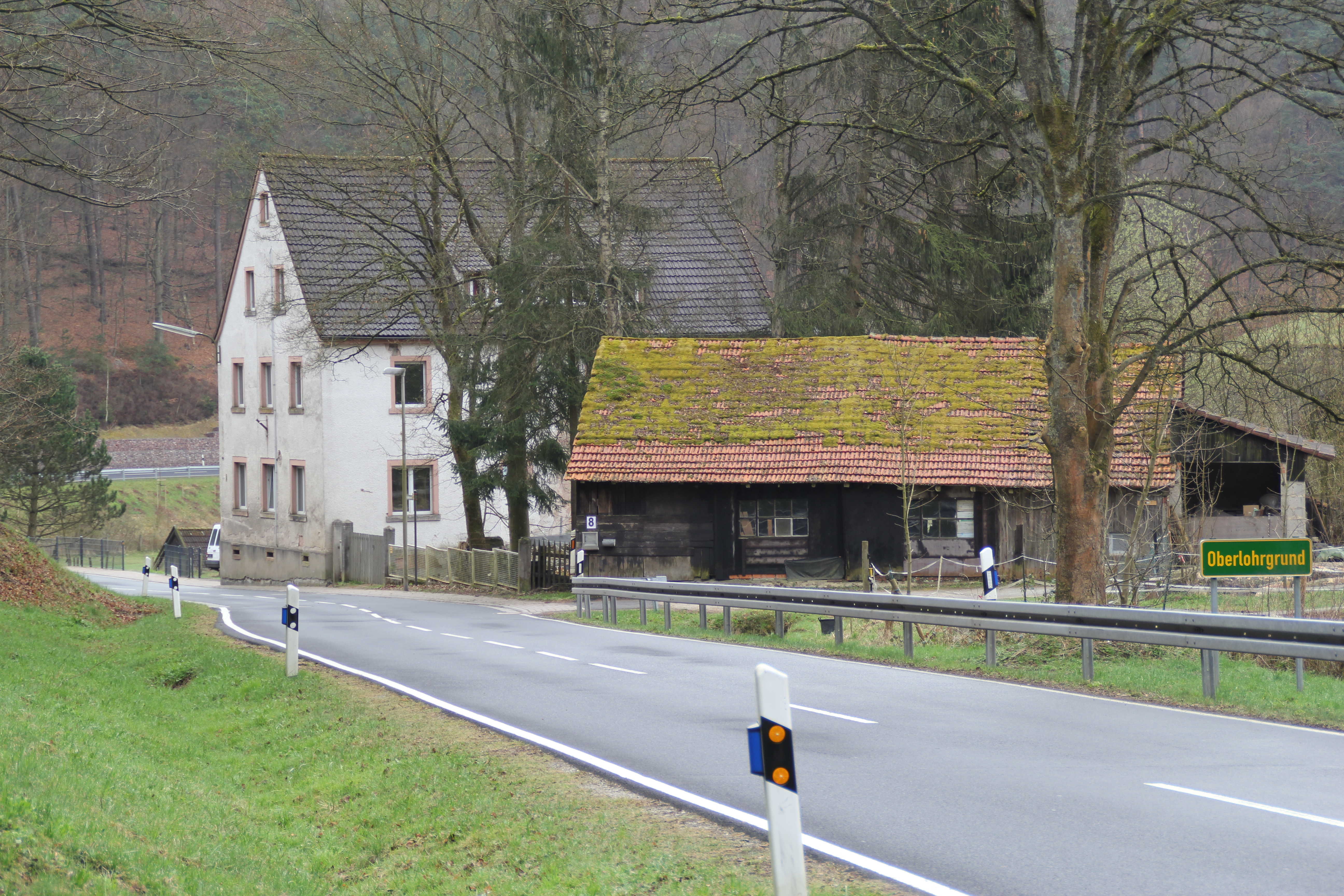 Oberlohrgrund bei Heinrichsthal, Bayern